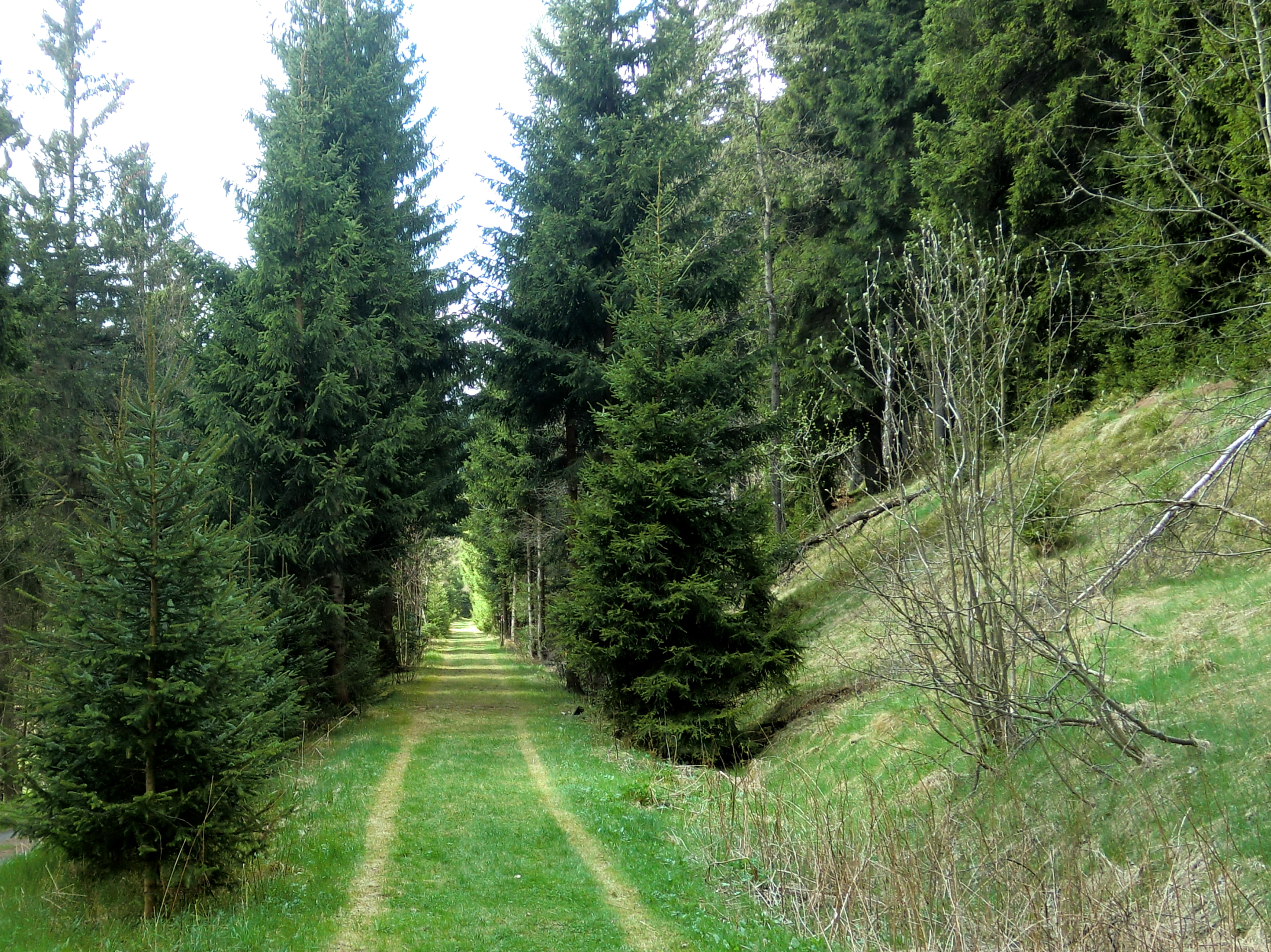 Bahndamm bei Hermsdorf-Rehefeld.km 56